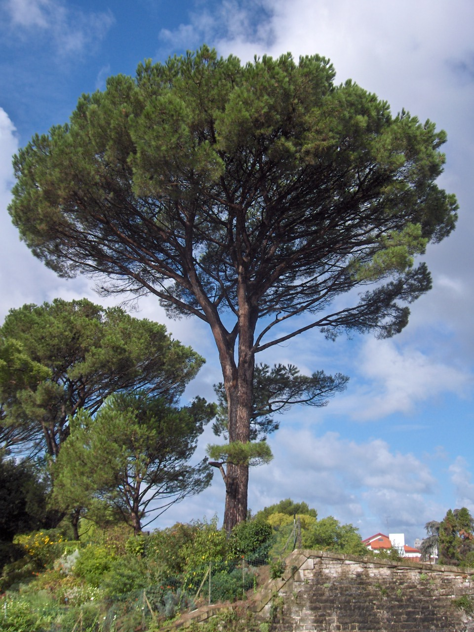 Pinus pinea (Stone Pine); Botanical park, Bayonne, France